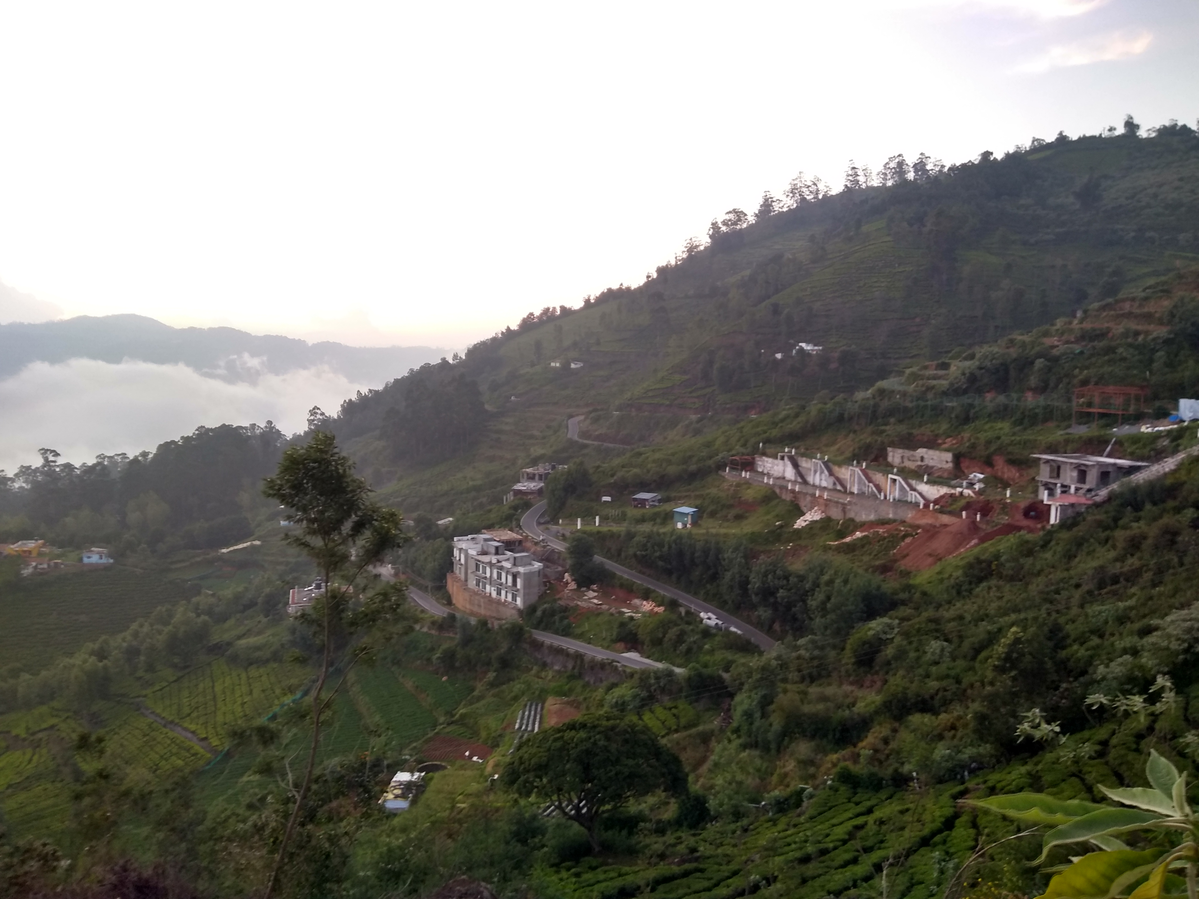 உதகமண்டலத்தின் மலைக்காட்சி, தமிழ்நாடு, இந்திய ஒன்றியம்.